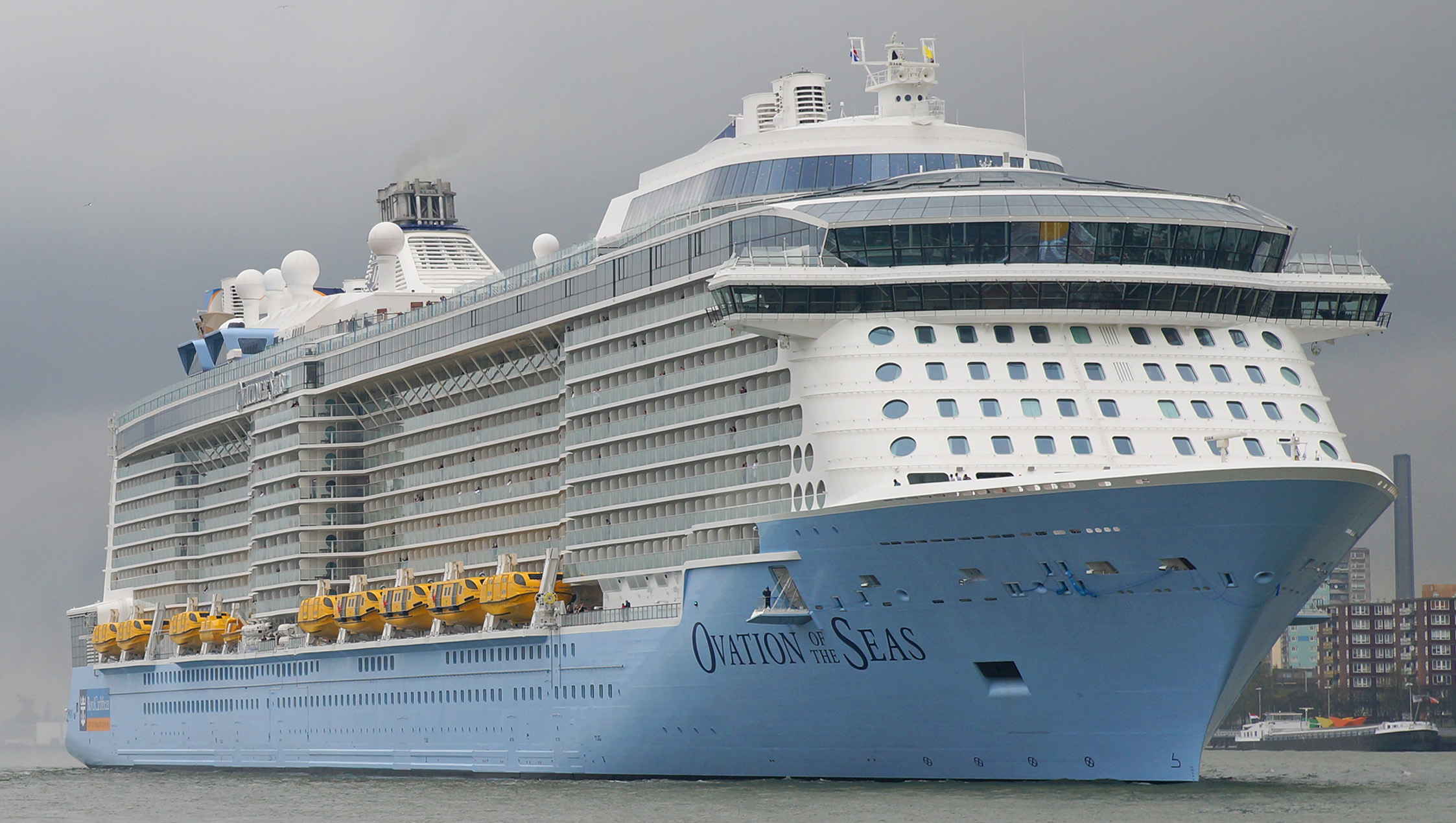 Nieuwe Maas Rotterdam 15-4-2016